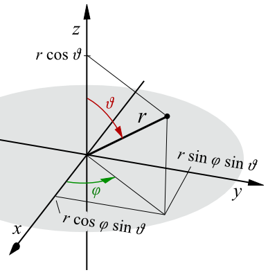 polära koordinater i 3D